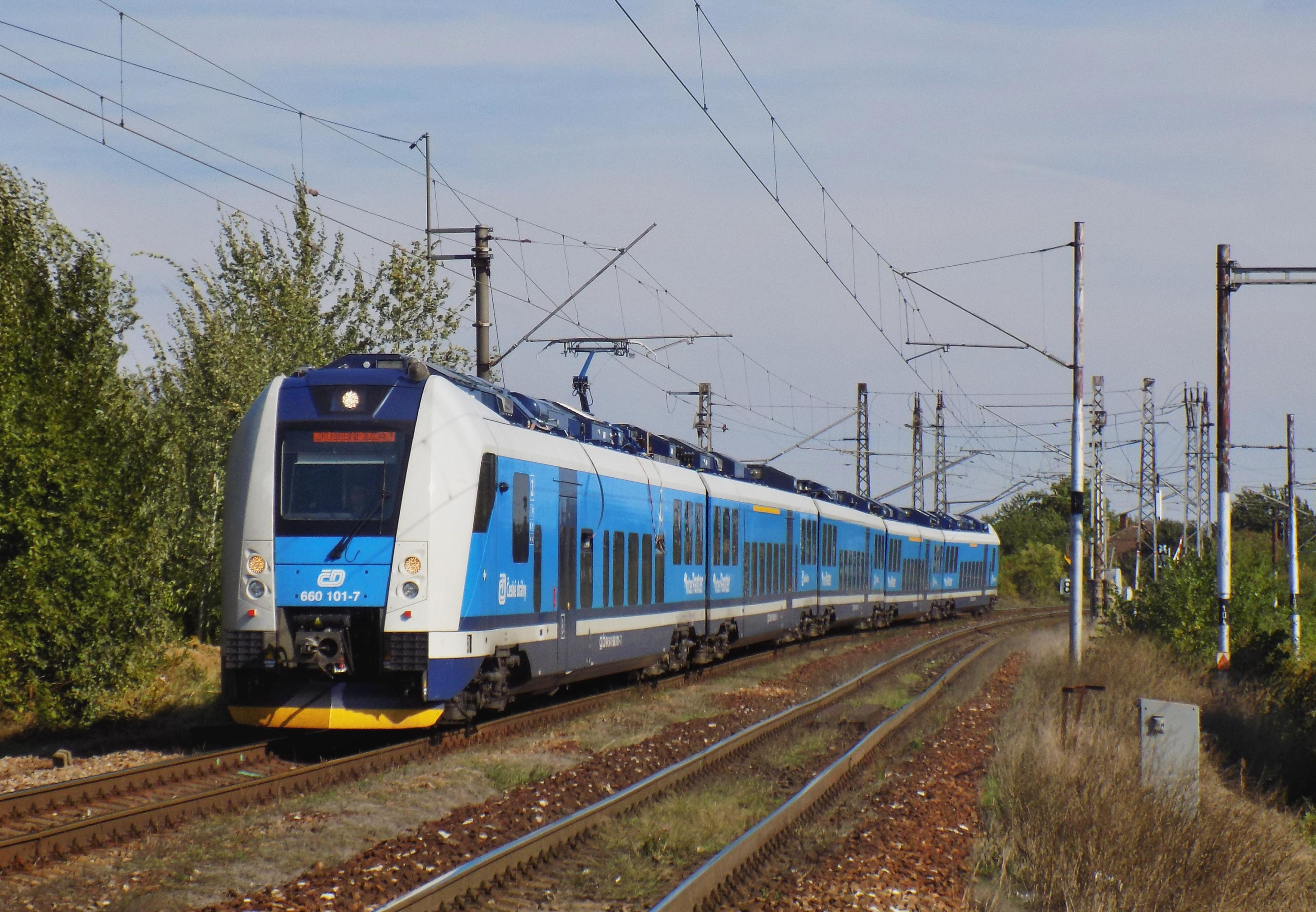 EJ 660 101-7 při zkužební jízdě z Havlíčkova Brodu do Kolína